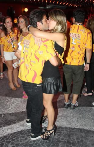 Bruno Gagliasso e Giovana Ewbank se beijam em camarote Devassa.